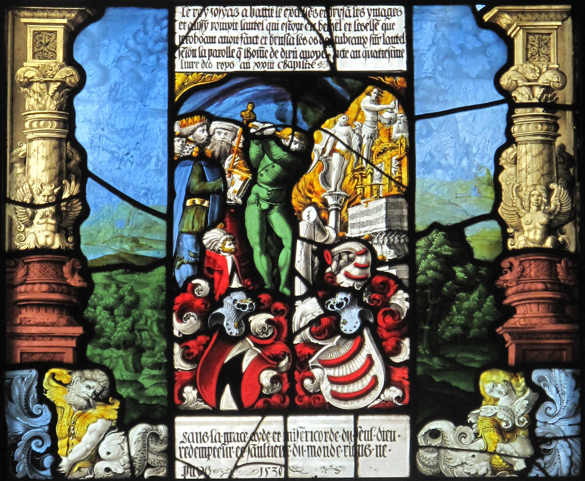 Kirche Jegenstorf, Scheibe 1530.